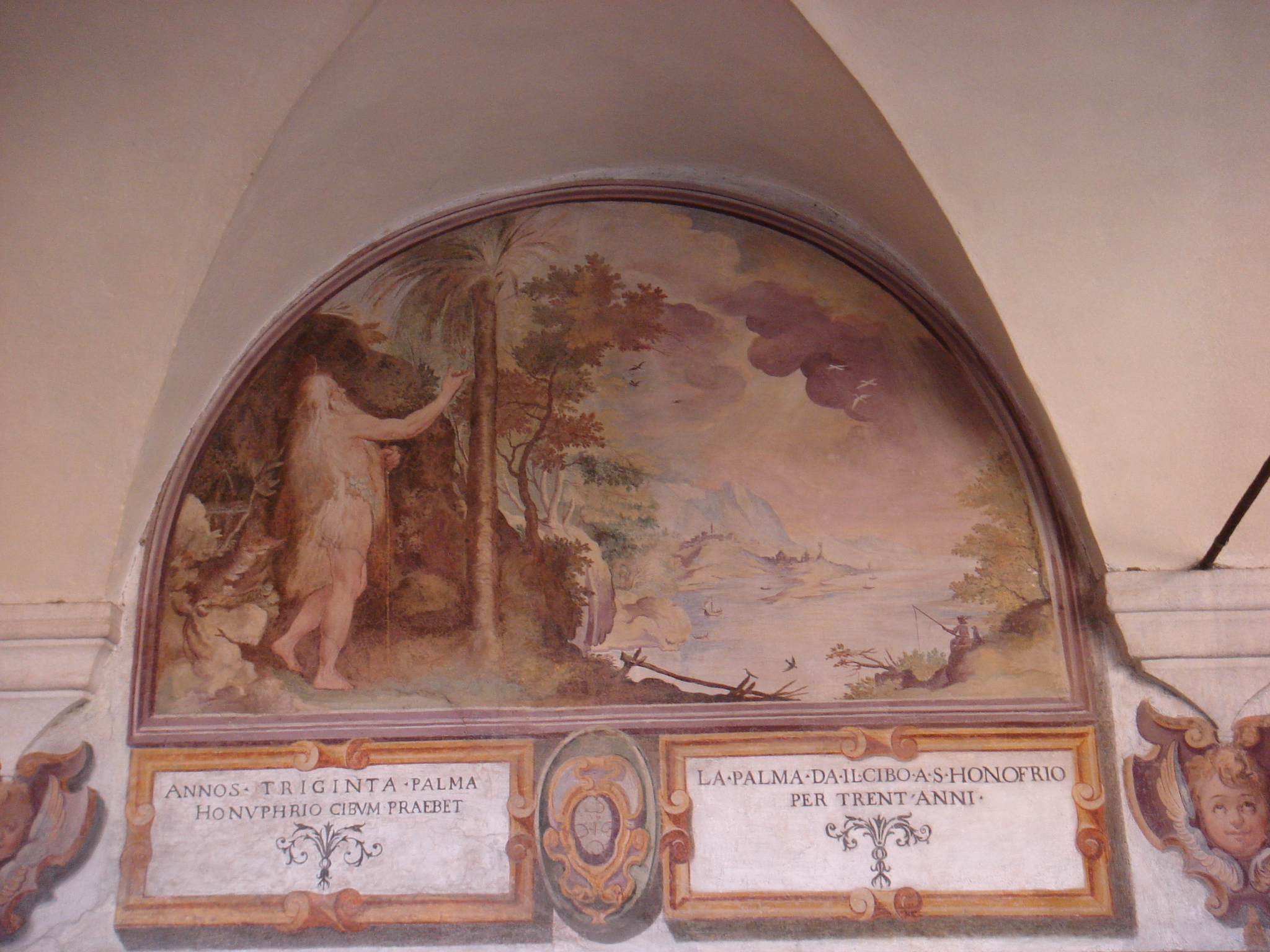 Roma, sant'Onofrio al Gianicolo, chiostro: la dieta di datteri. Affresco del Cavalier d'Arpino.